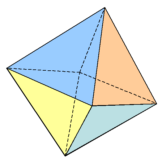 ruimtelijk figuur - eigen werk ism danielm - publiek domein